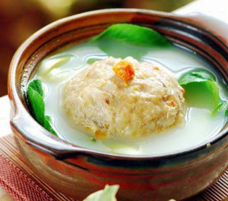 狮子头01